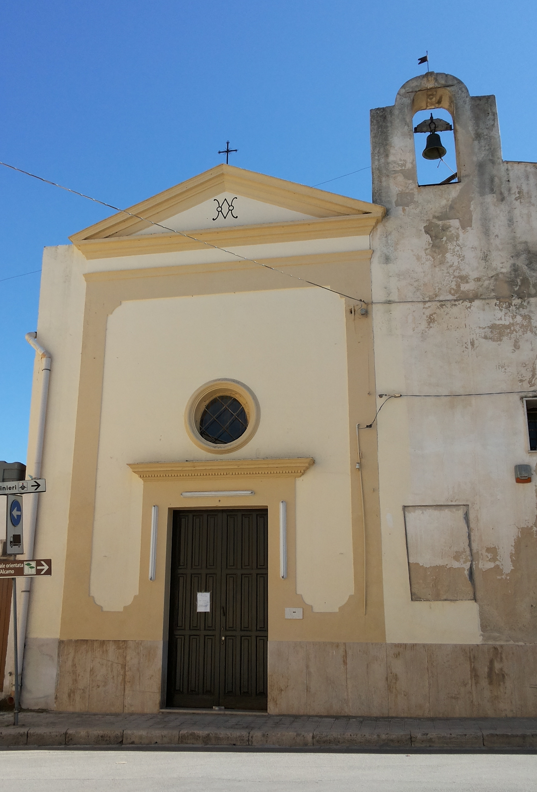 Chiesa di Santa Maria della Catena (Alcamo) - Facciata